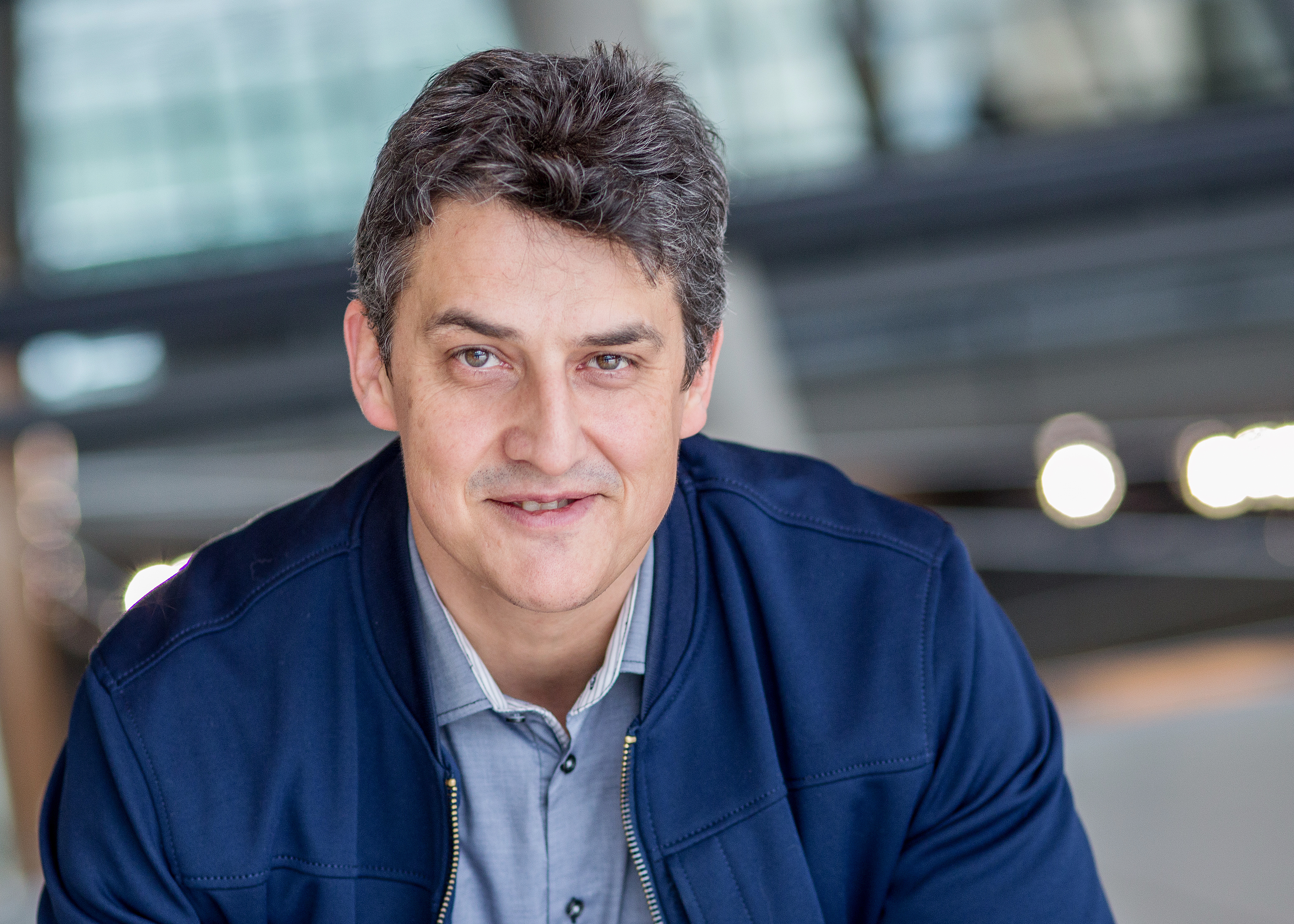 Fotografin: CaraMel Fotohandwerk